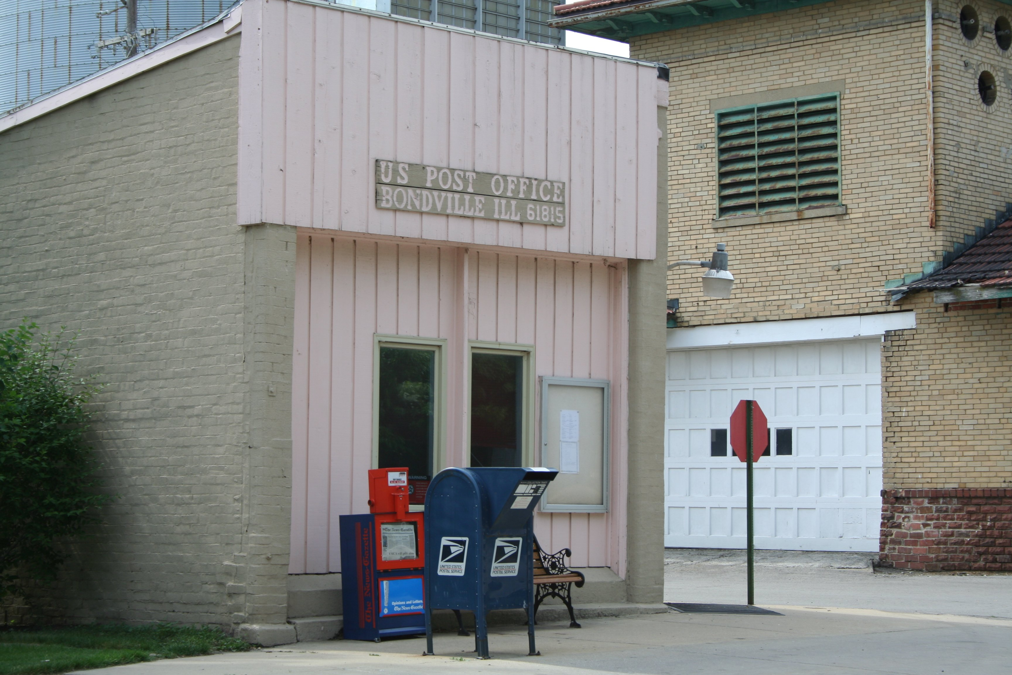 Bondville Illinois Post Office